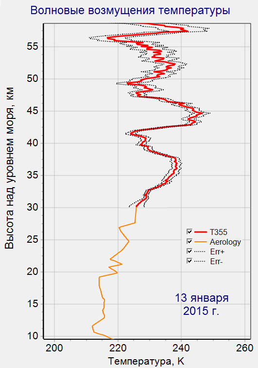 Сильные волновые возмущения температуры по данным аэрологии (ниже 30 км) и лидарного зондирования (выше 30 км) над г. Обнинском. Данные получены в НПО "Тайфун"